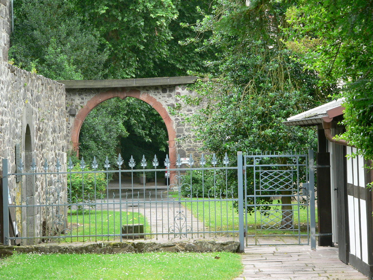 Klostergasse Kloster Arnsburg bei Lich, Hessen, Germany